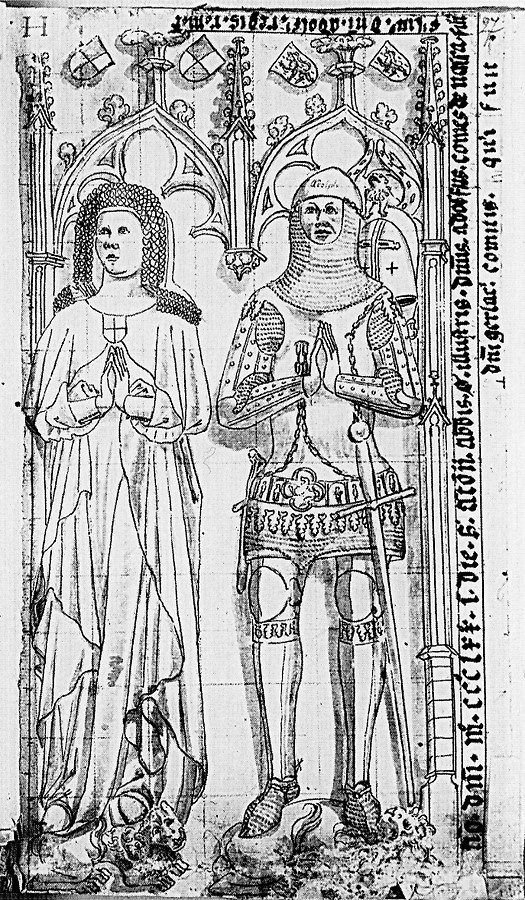 Tekening van het grafmonument van Adolf I van Nassau-Wiesbaden en Margaretha van Neurenberg in klooster Klarenthal uit het Epitaphienbuch van Heinrich Dors, 1632